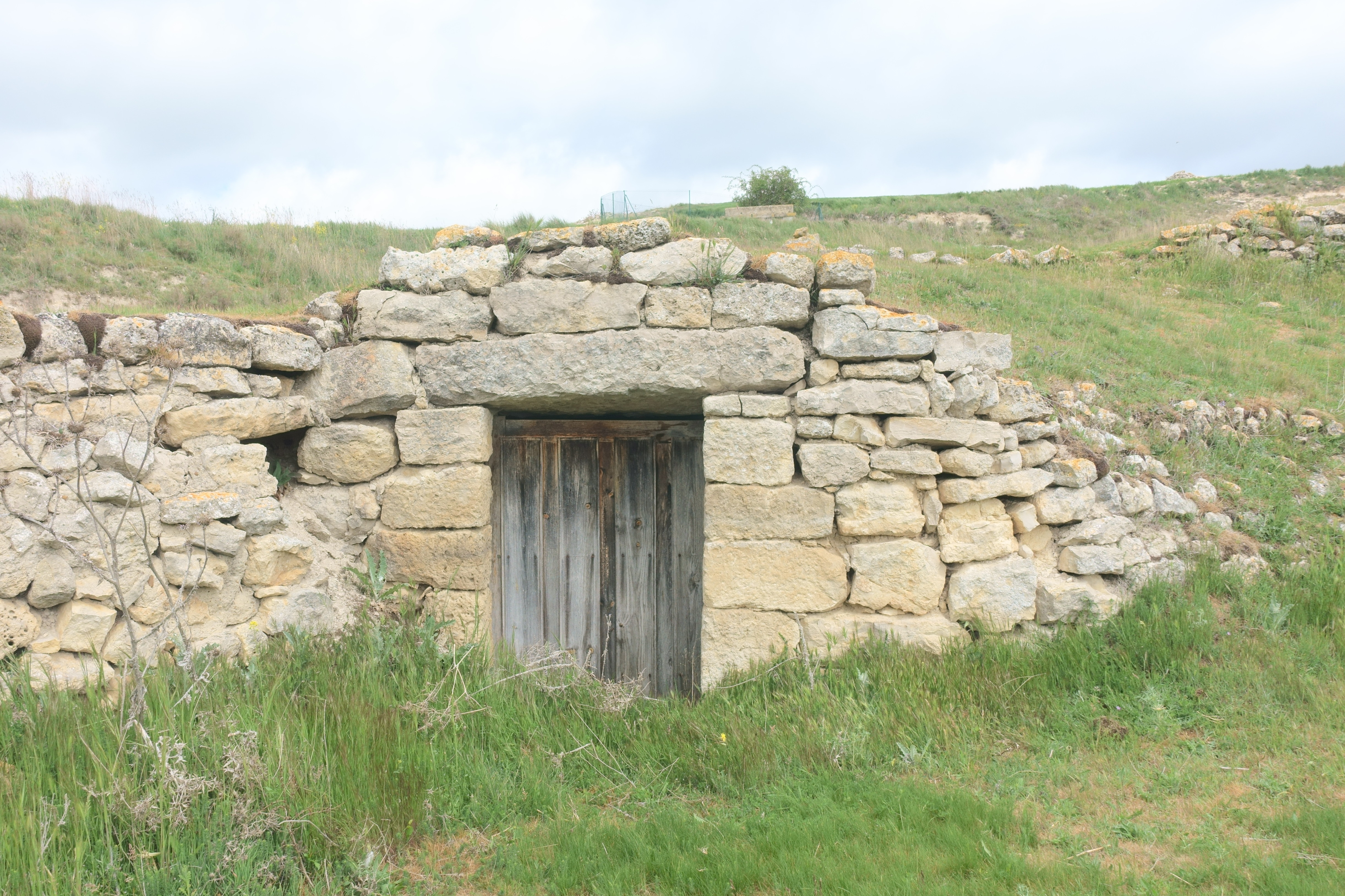 Entrada a una bodega en Castellanos de Castro (Burgos, España).